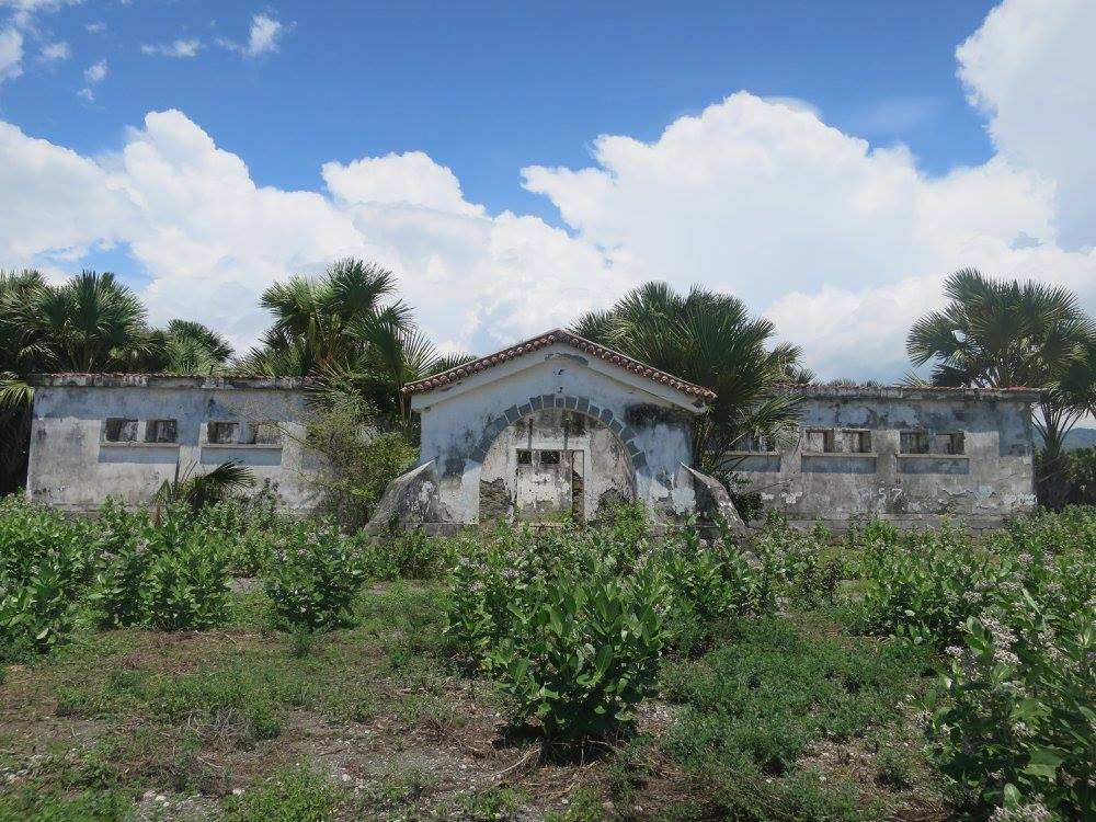 Edificio das Alfandegas, Betano